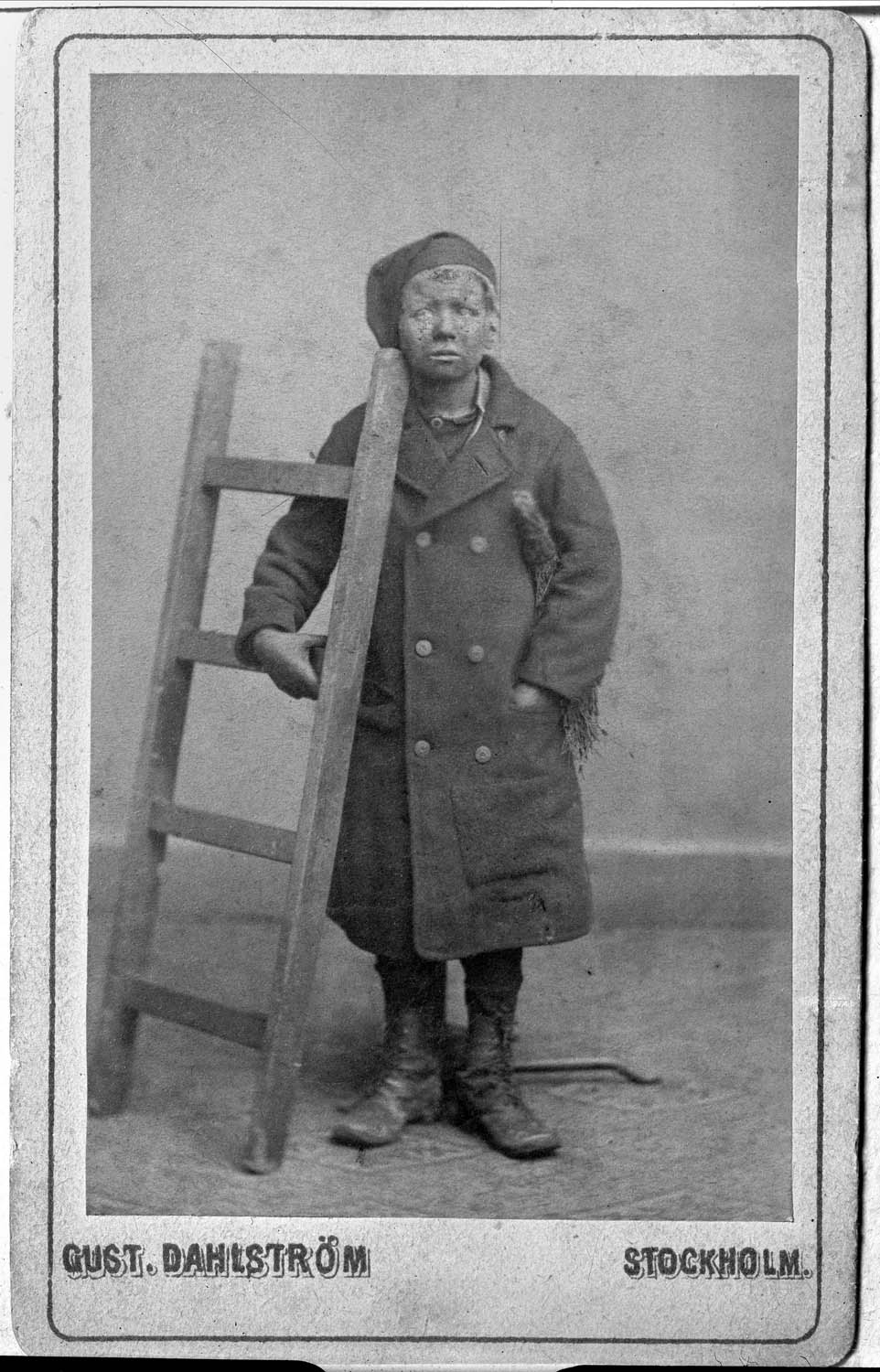 Sotarlärlingen Viktor Norin, Stockholm. Kabinettsbild, 1880-tal